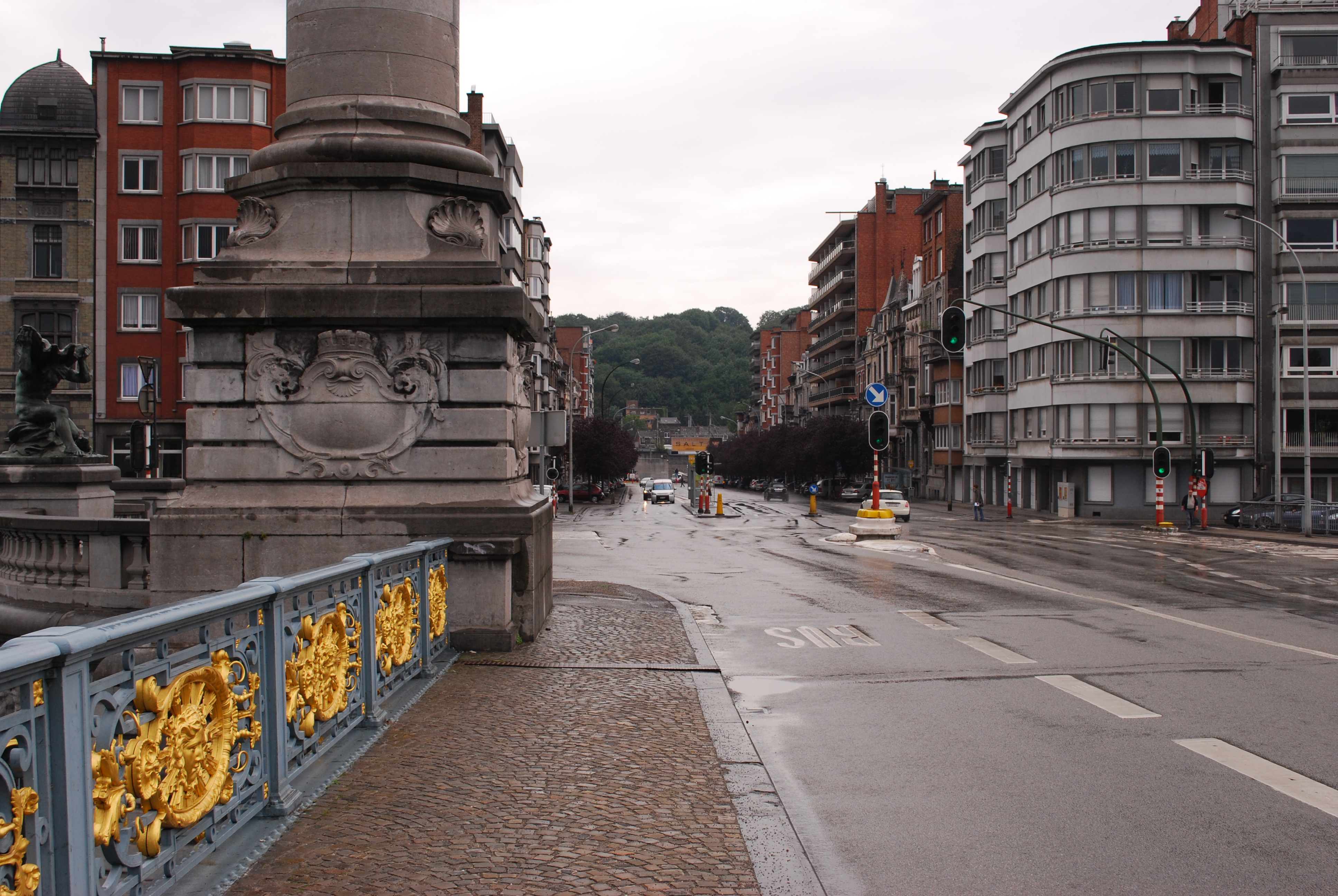 Le pont de Fragnée à Liège : vue vers l'avenue Emile Digneffe.